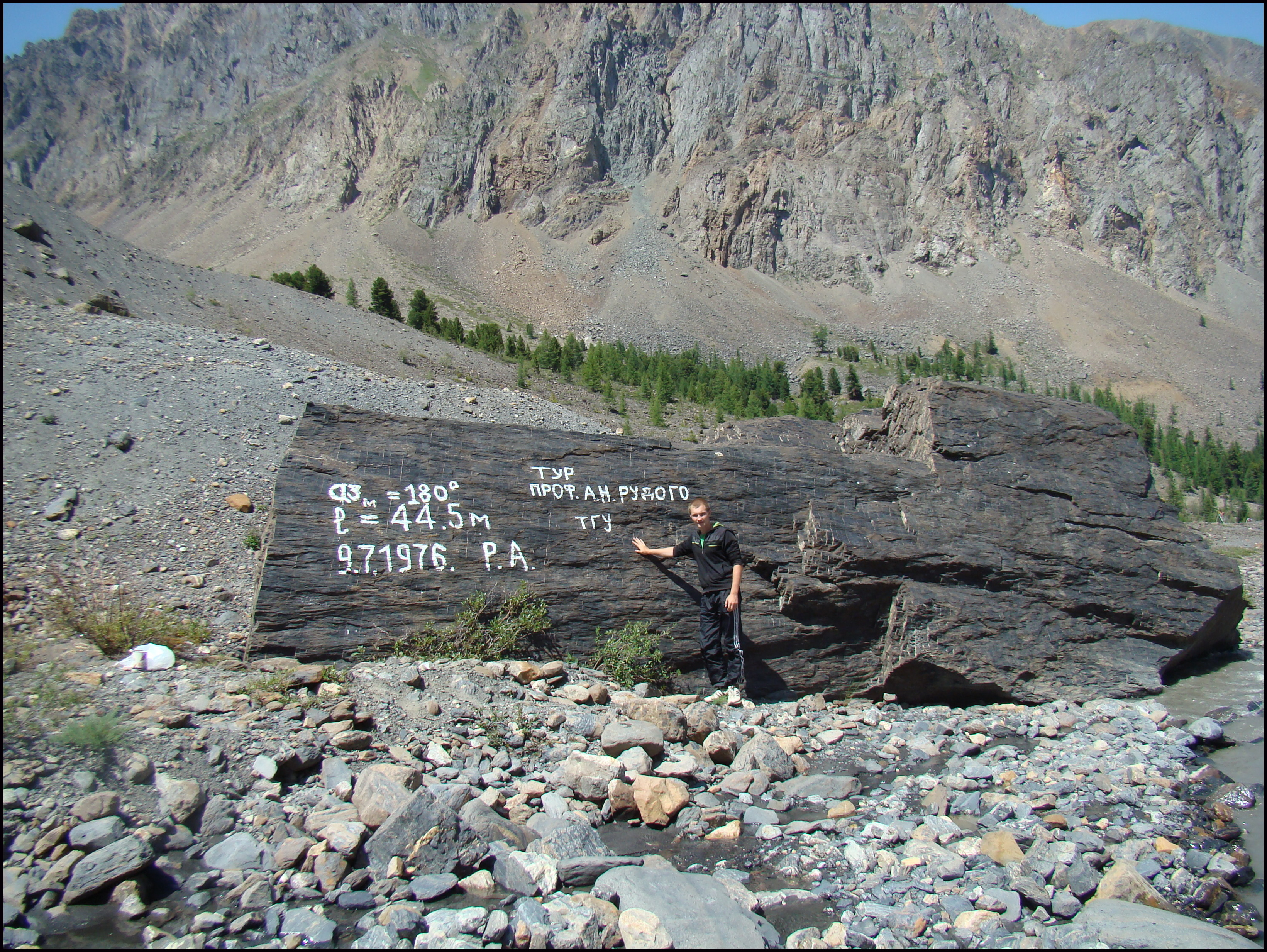 Тур А.Н. Рудого, установленный в июле 1976 года. С тех пор ледник Малый Актру отступил на 507 метров. 17 июля 2012 года.